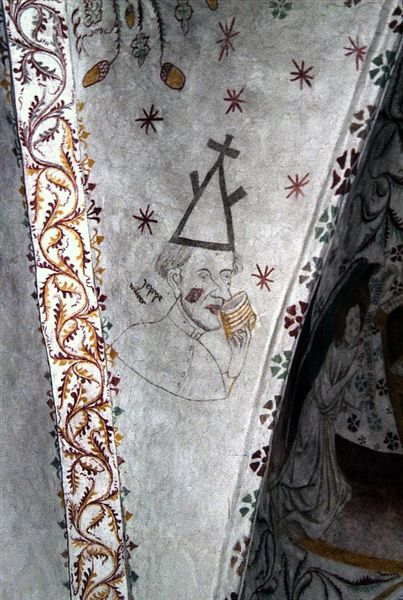 Vordingborg Vor Frue Kirke i Danmark. Korhvælv, Jeppe murer